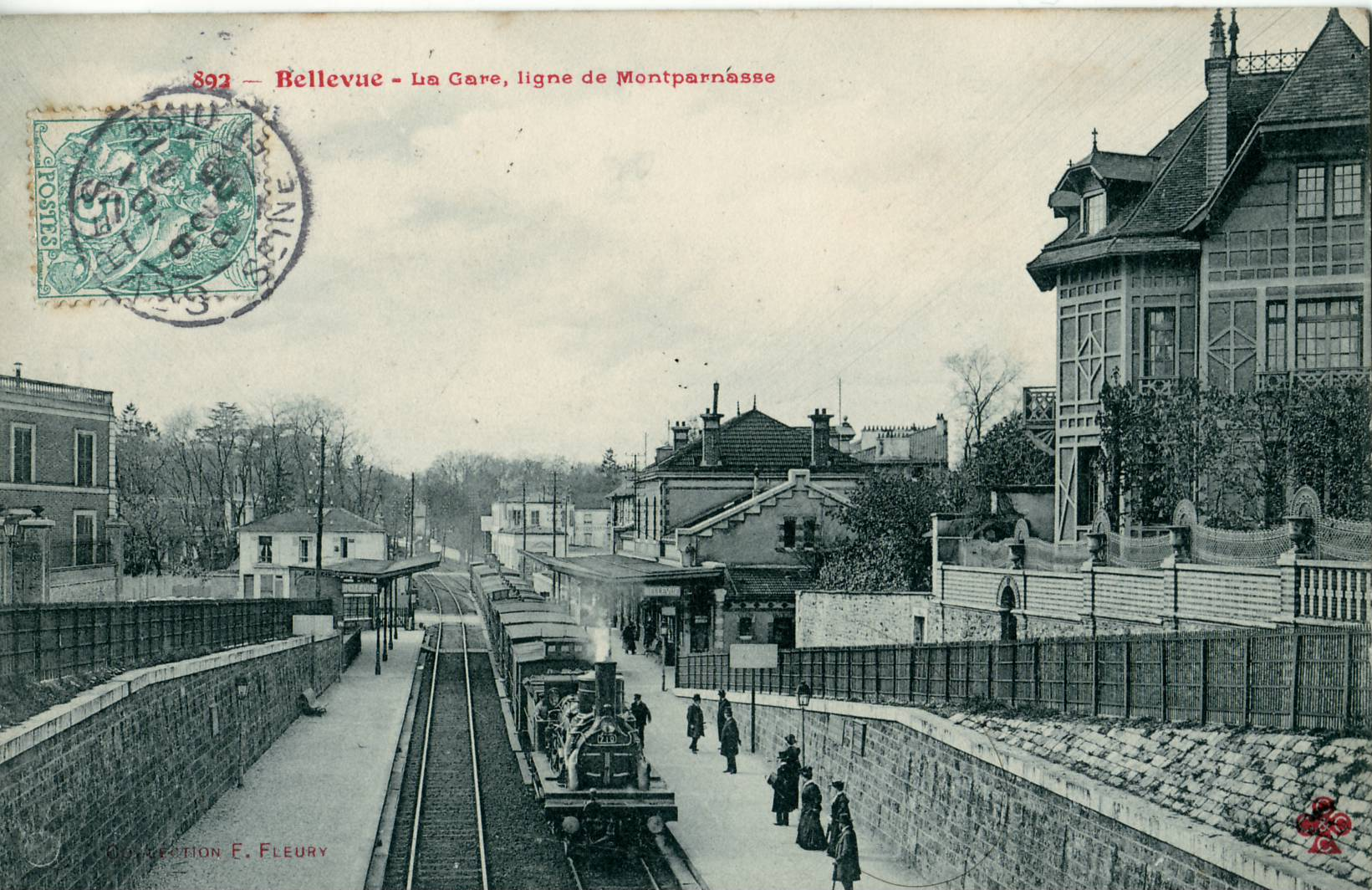 carte postale ancienne éditée par Fleury - CCCCBellevue : la Gare, ligne de MontparnasseBellevue est un quartier de Meudon.